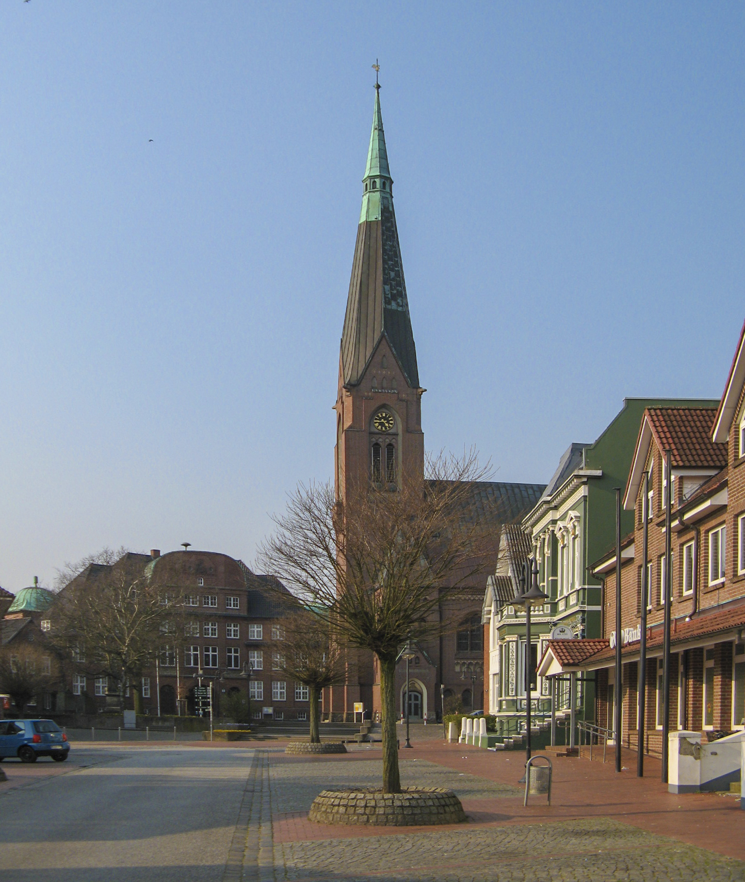 Stadtzentrum Marne von links nach rechts: Rathaus, Kirche, Apotheke